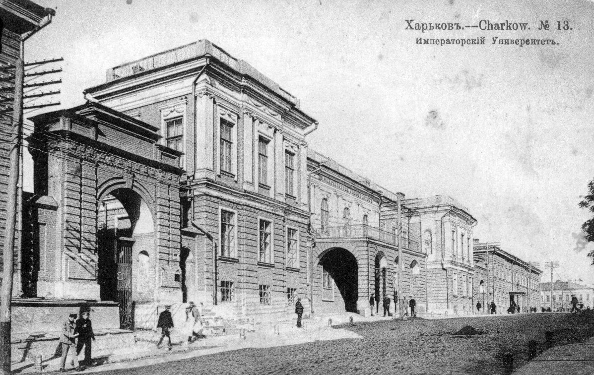 Харьковский университет, старое здание по ул. Университетской, бывший Губернаторский дворец